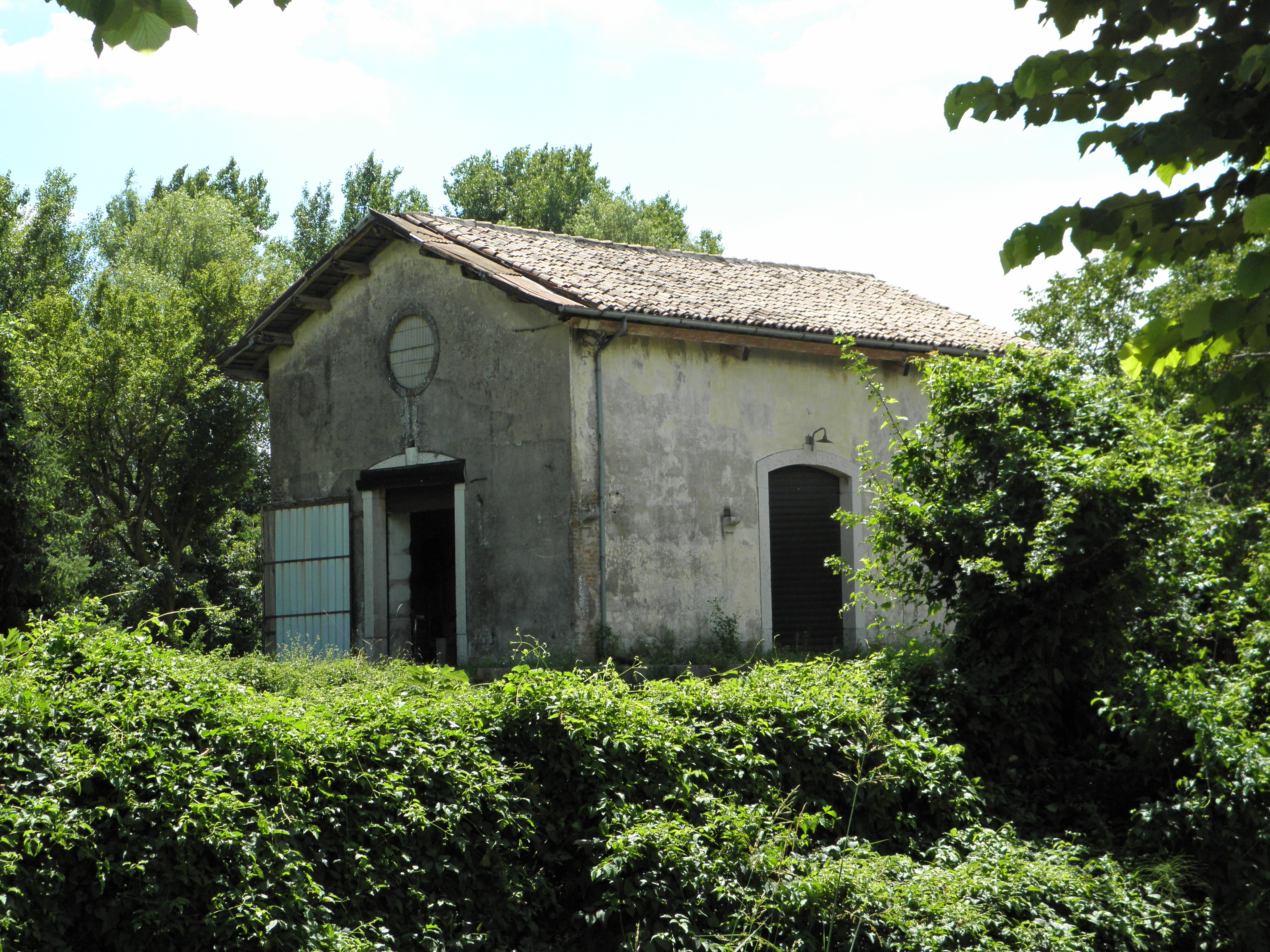 L'ex stazione ferroviaria di Orgiano, fotografata nel luglio 2020.